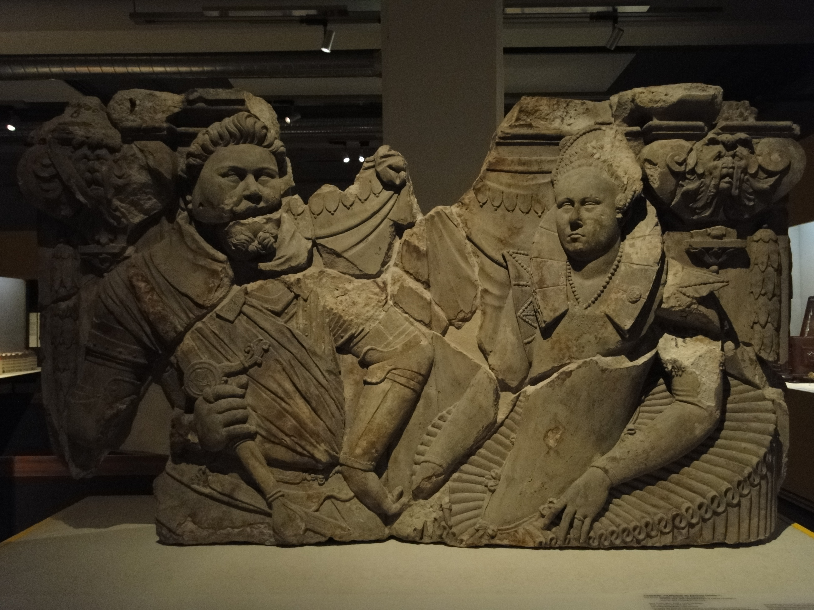 Fragment des Fürstenerkers, Schloßstraße 30 (Dresden), im Dresdner Stadtmuseum; Fotografie mit Fotoerlaubnis